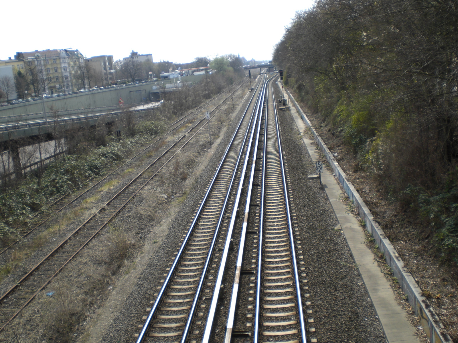 die Wannseebahn in Berlin von der Saarstraße in Richtung SW gesehen